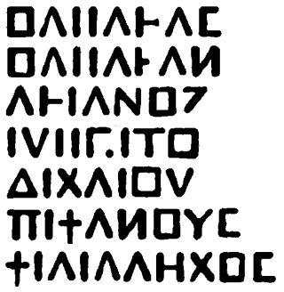 BASILEOS BASILEON ARSAKOU EUERGETOU DIKAIOU EPIPHANOUS PHILELLENOS - Sistema di scrittura arcaico